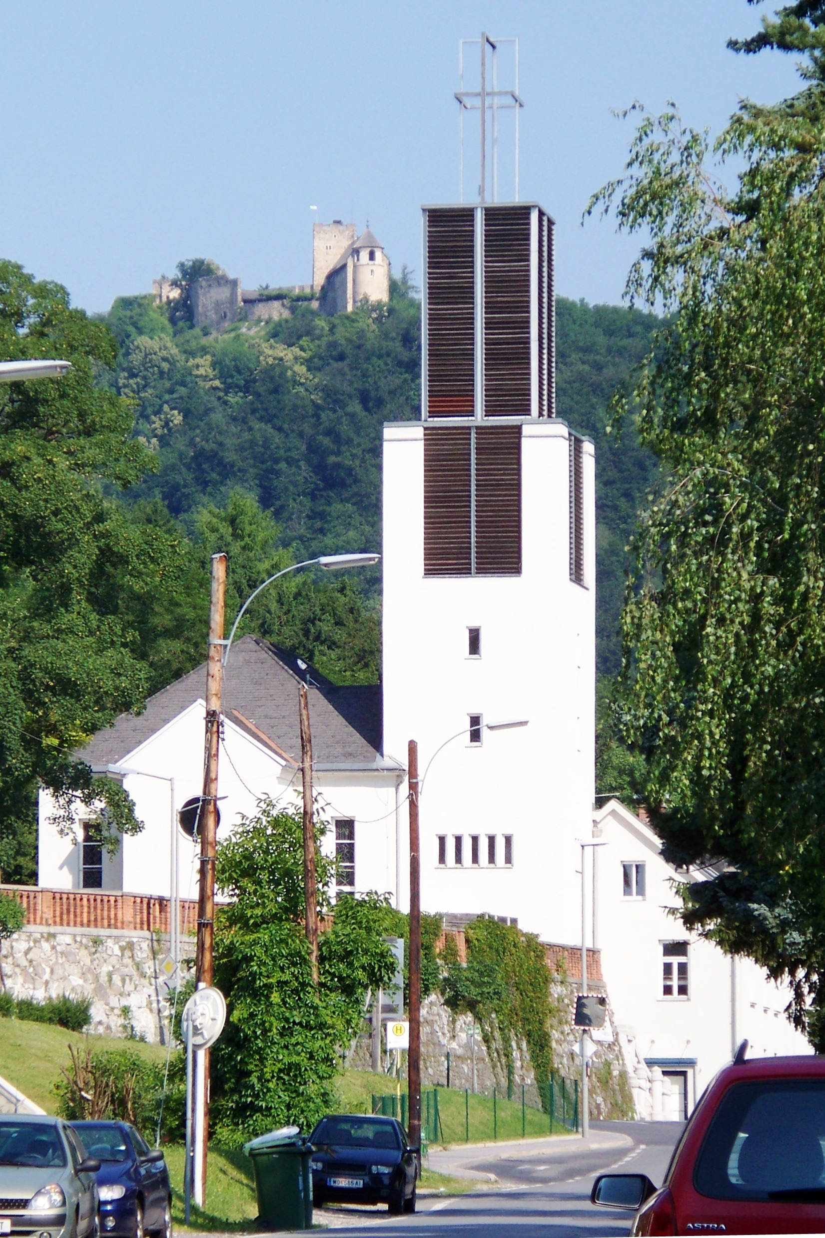 St. Anna Kirche in Graz Gösting mit der Burgruine Gösting im Hintergrund